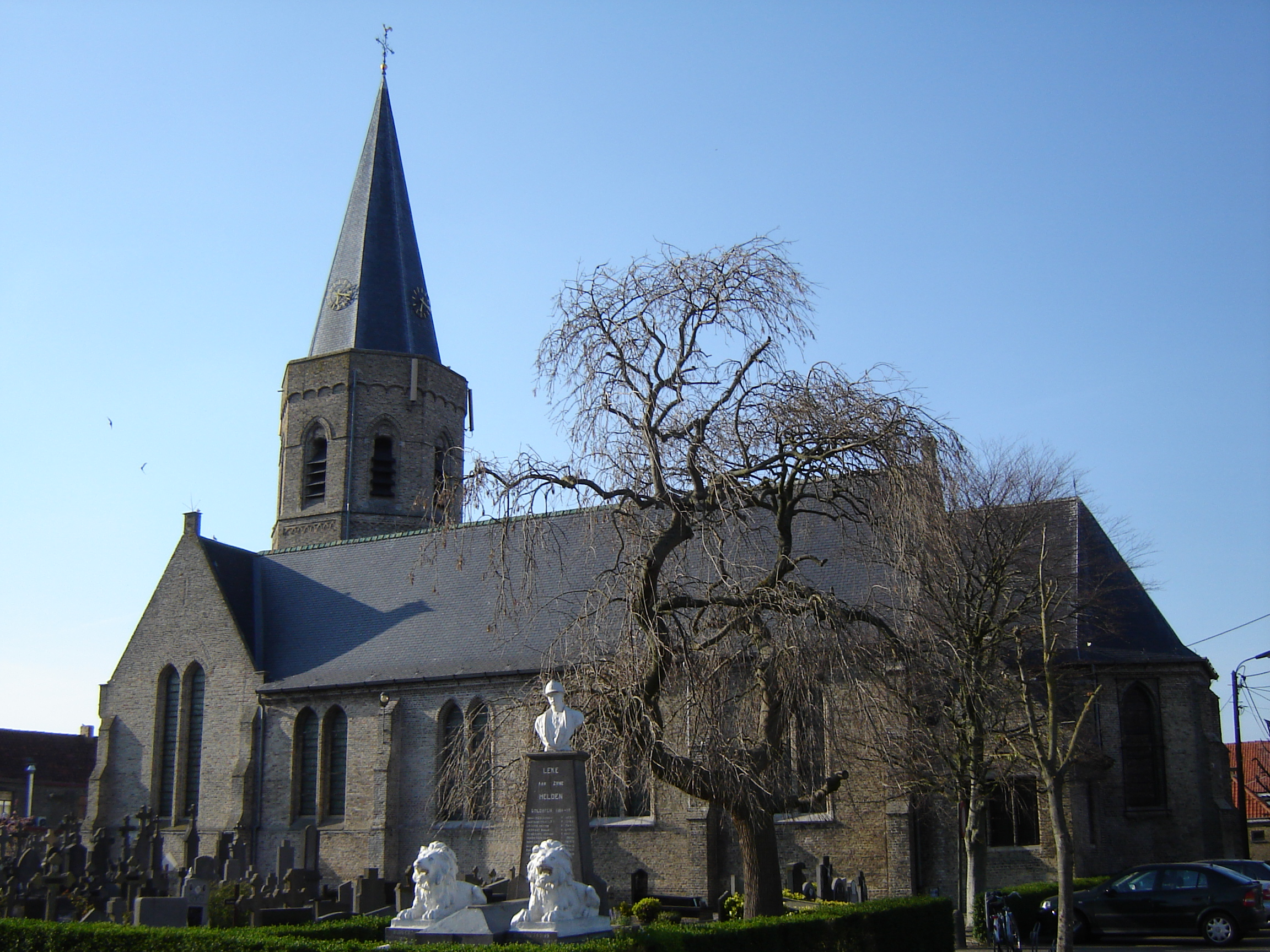 Sint-Niklaaskerk in Leke Church of Saint Nicholas in Leke, Diksmuide, West Flanders, Belgium